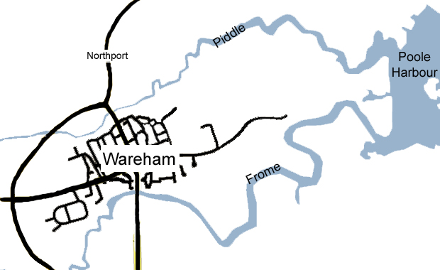 Carte de Wareham, Dorset, Royaume-Uni Summary Description Carte de Wareham Date09/07/2007Sourcerealisation personnelleAuthorCyril5555Permission (Reusing this file) voir ci-dessous Carte de Wareham